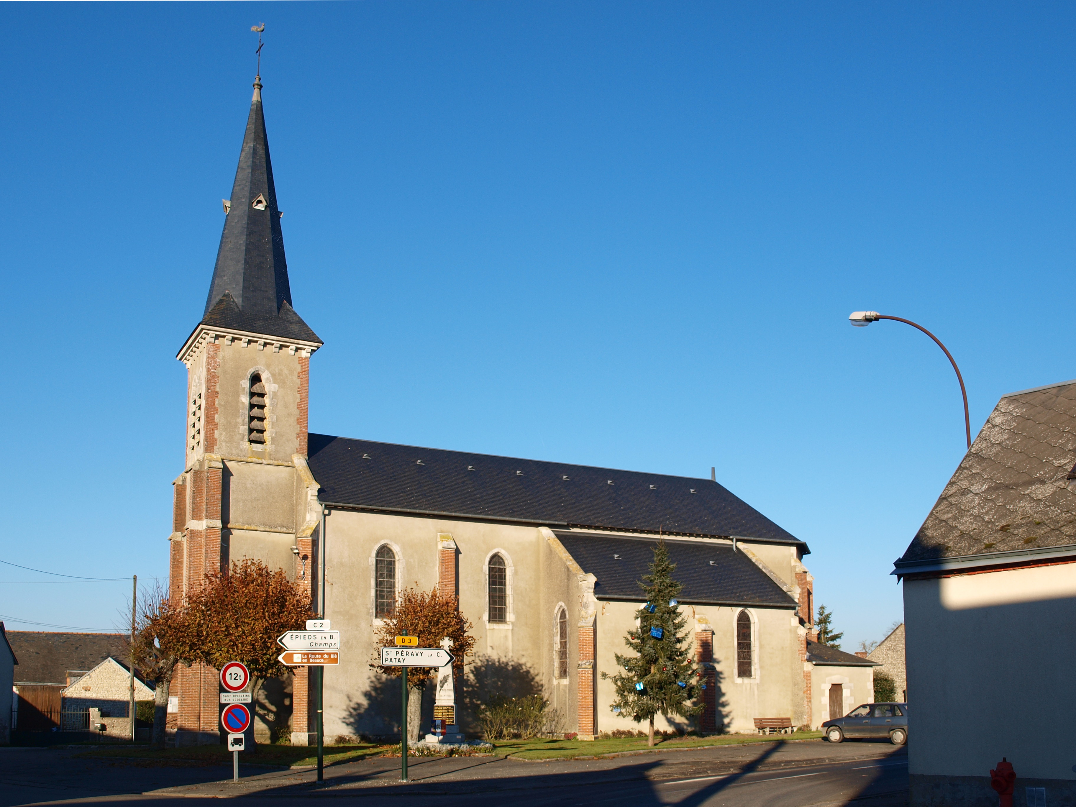 Saint-Sigismond (Loiret, France) ; église